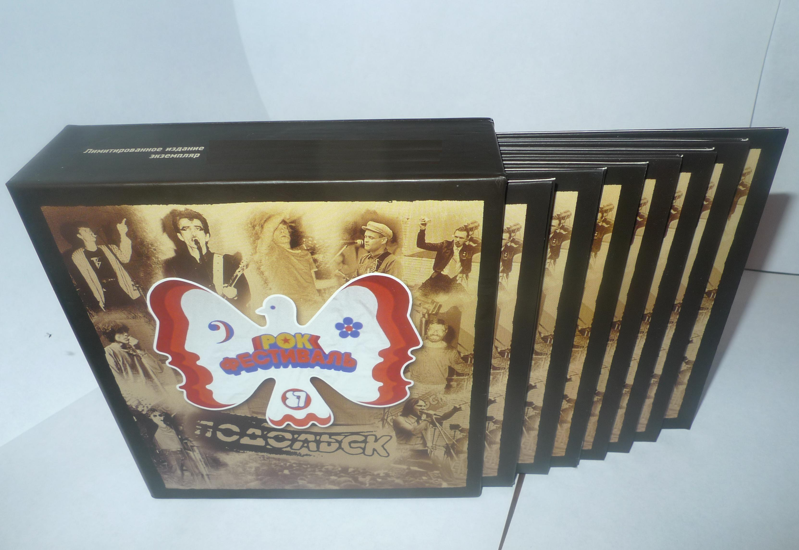 Комплект CD Подольск 87 264